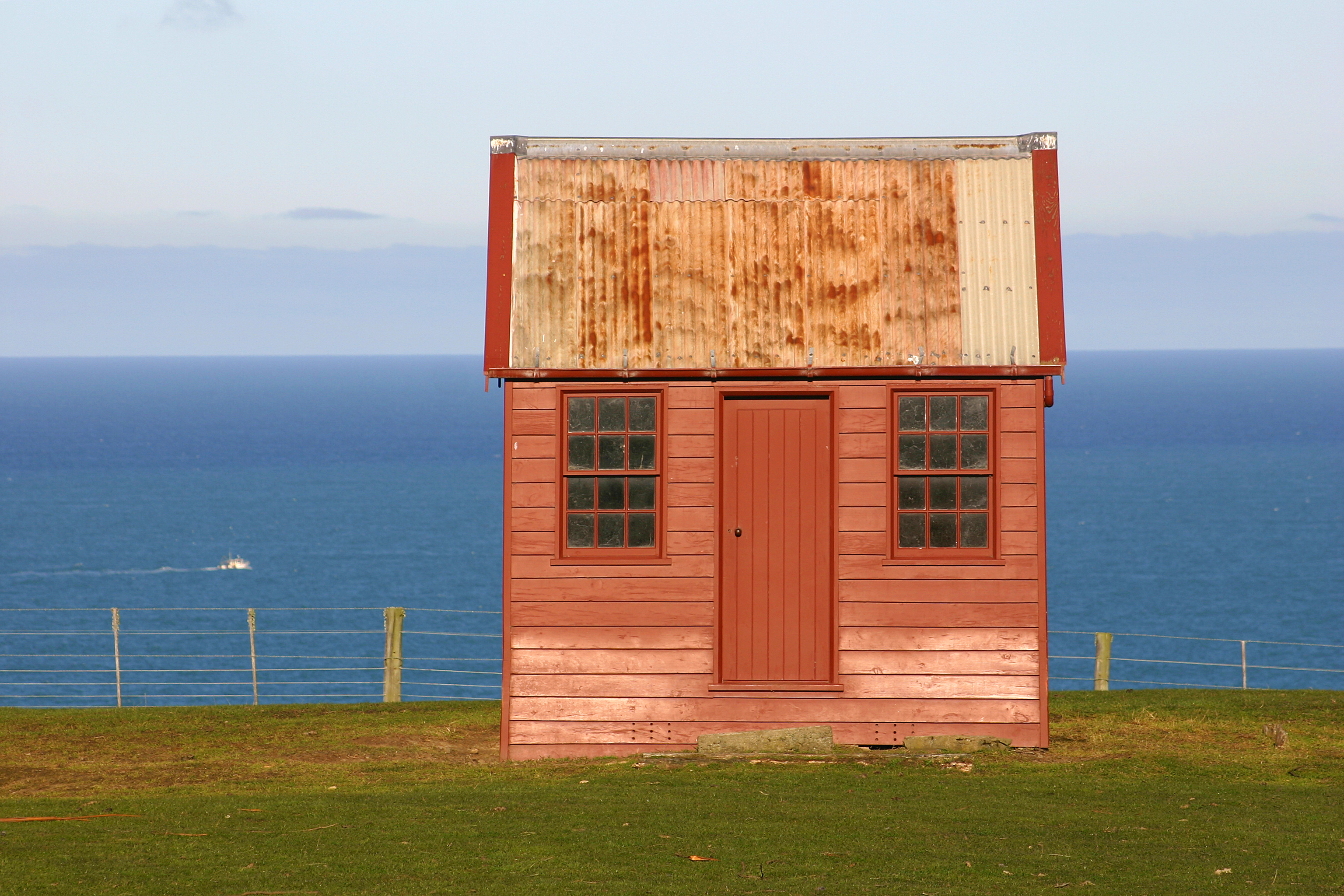 Matanaka Farm building.